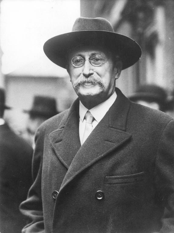 Léon Blum en 1936.